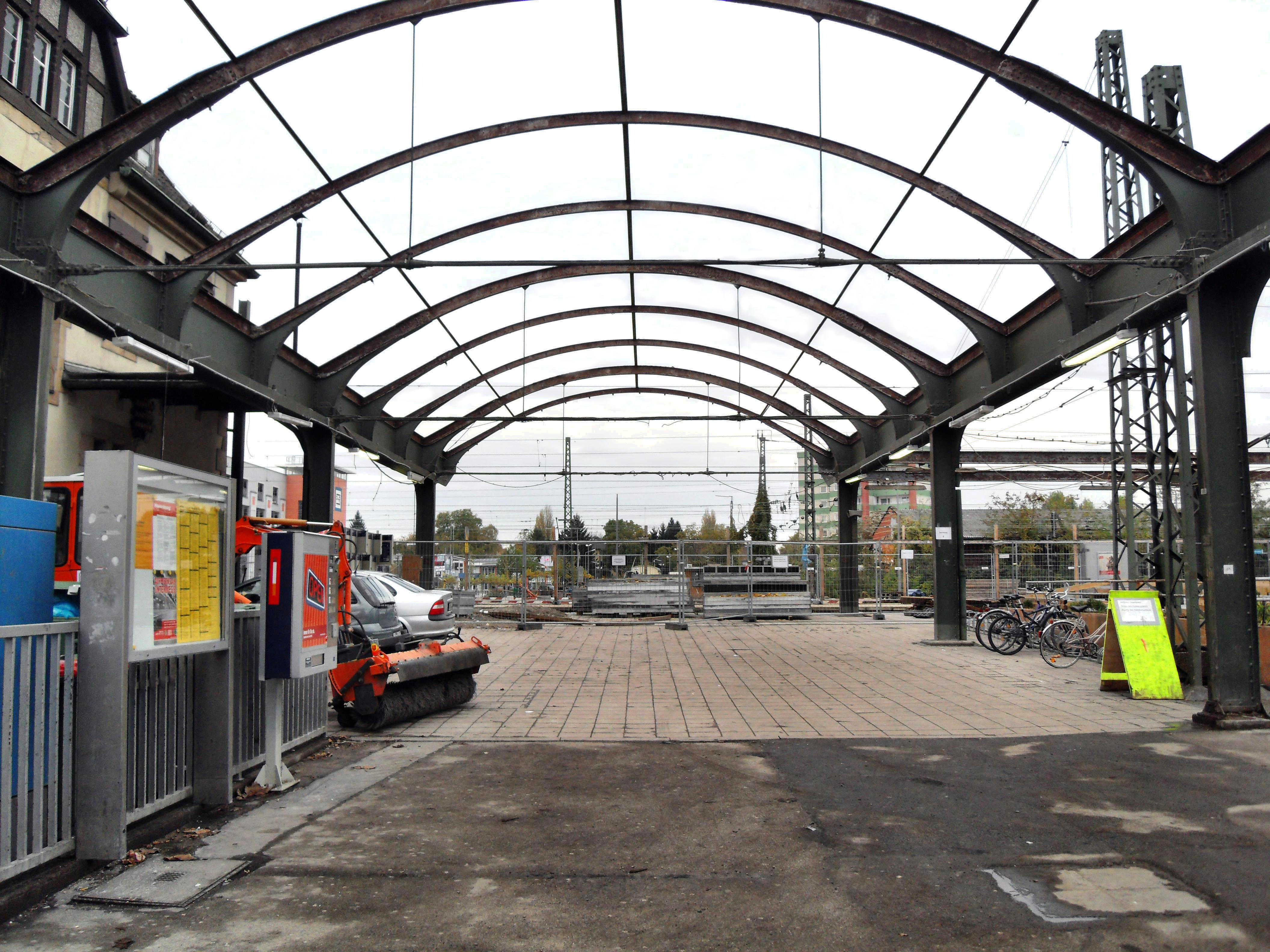 Der Querbahnsteig des Wormser Hauptbahnhofes in der Nähe der Bahnsteige 8, 9 und 11